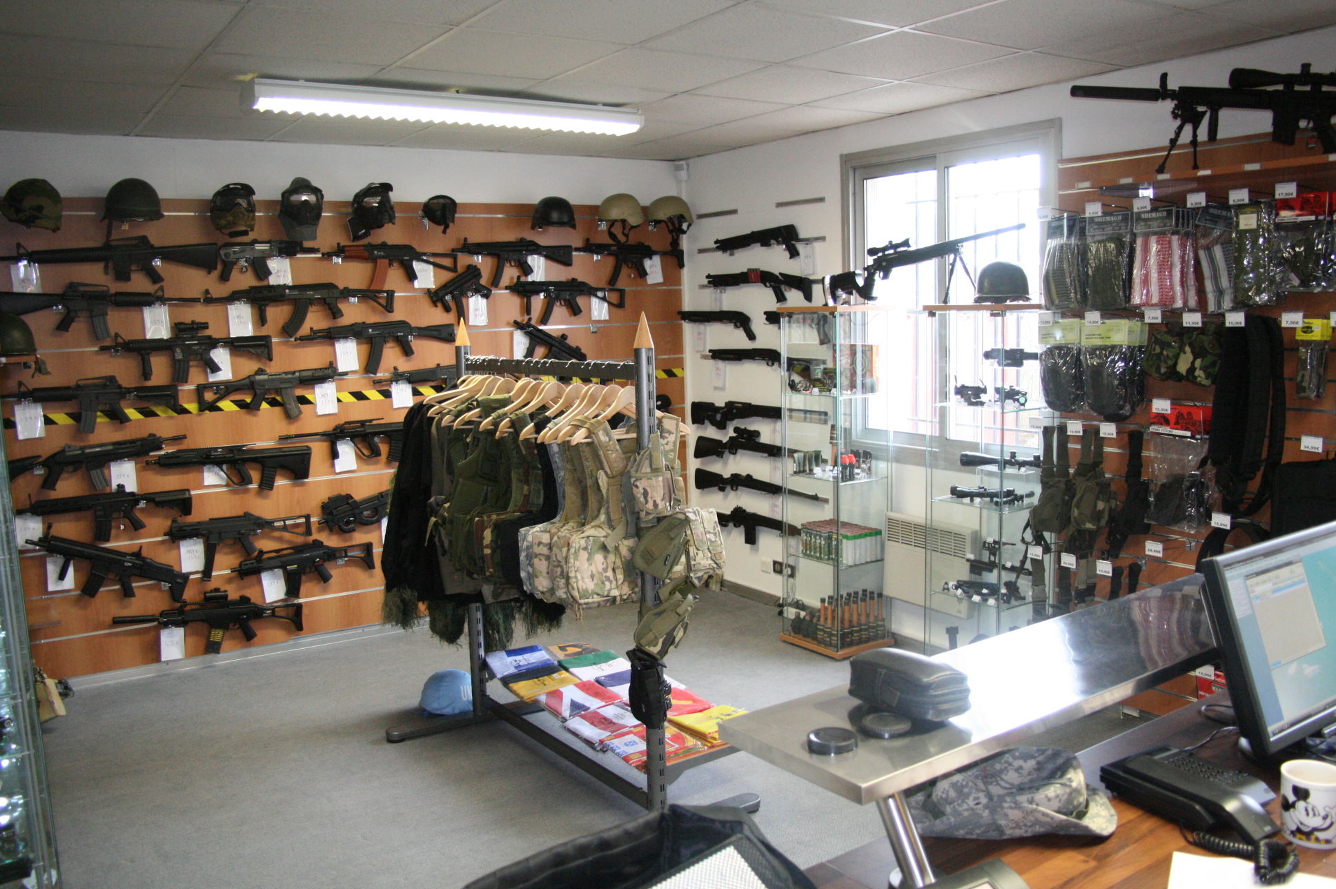 Photo 1 de la boutique jb airsoft